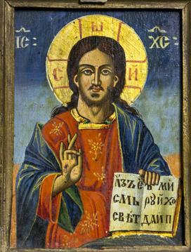 Исус Христос, црква Св. Богородица, Лешочки манастир, с. Лешок. Околу 1879 година. Автор: се атрибуира на Михаил Ѓурчинов од Галичник. Дим: 23 Х 18 Х 2,5 см.